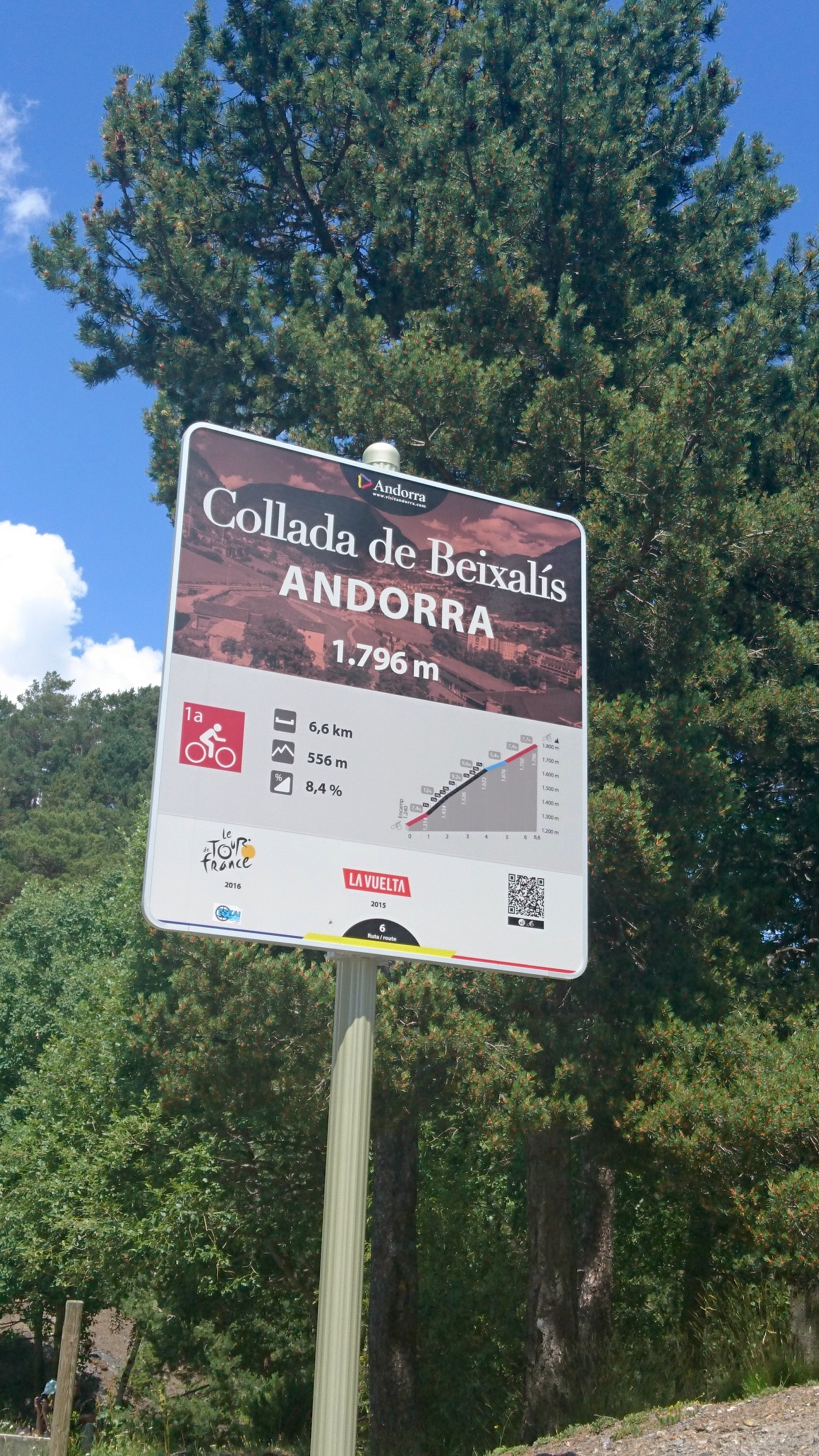 Sommet du col de Beixalis